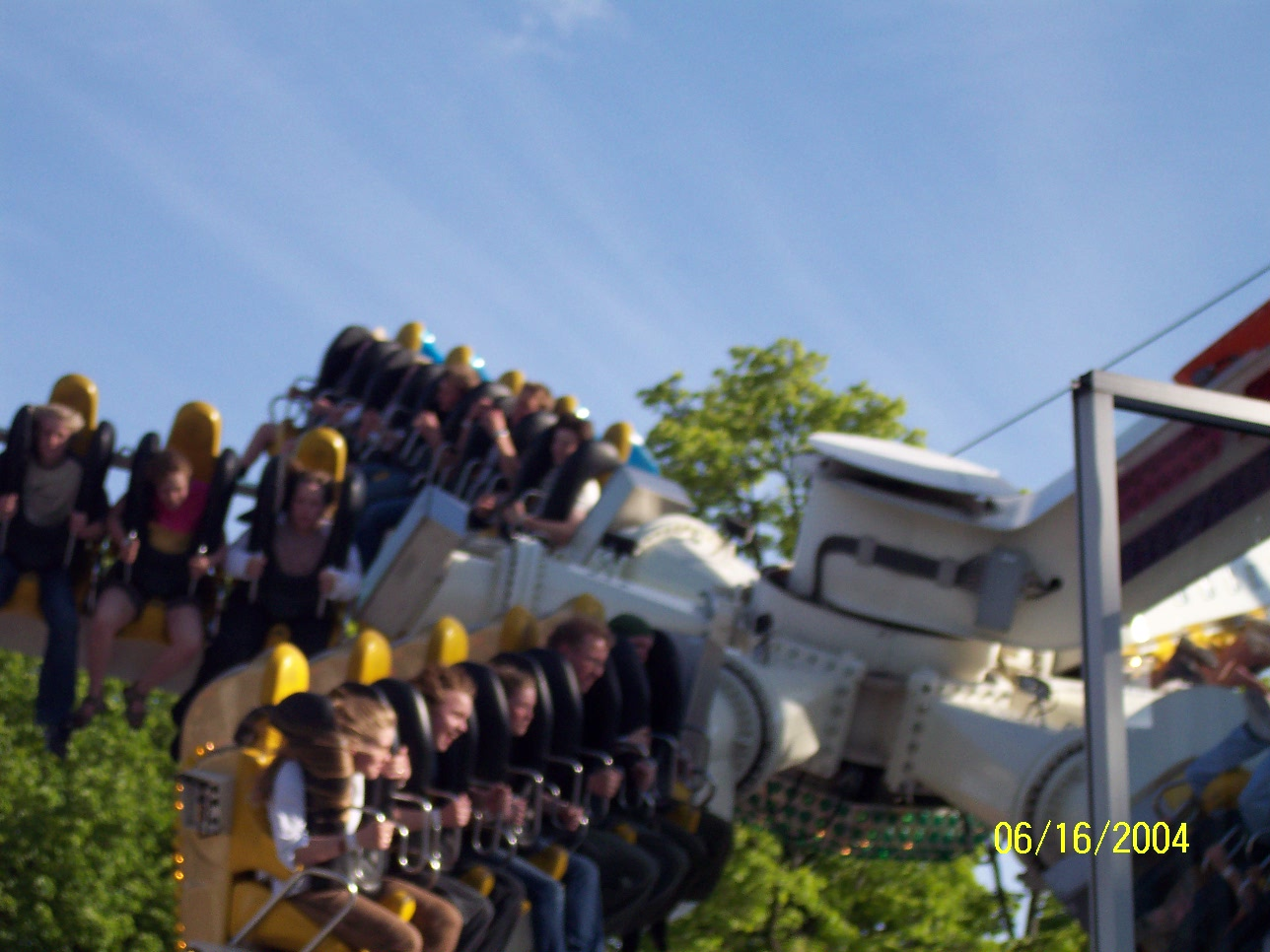 Attraksjonen Extreme i Gröna Lund i Sverige. Bilde tatt av Bruker:ThorRune på klassetur 2004